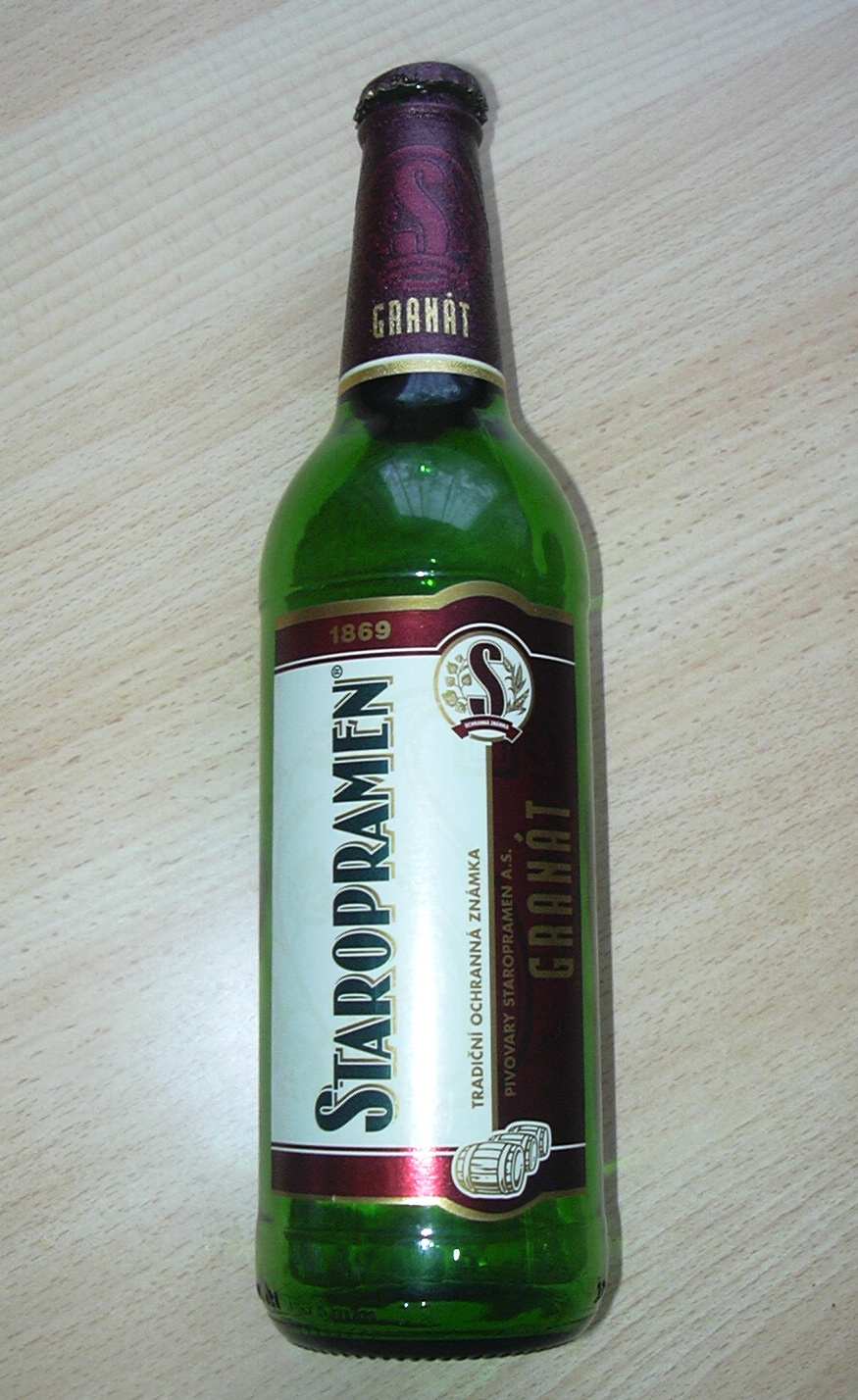 Staropramen Granát (Beer- czech republic)